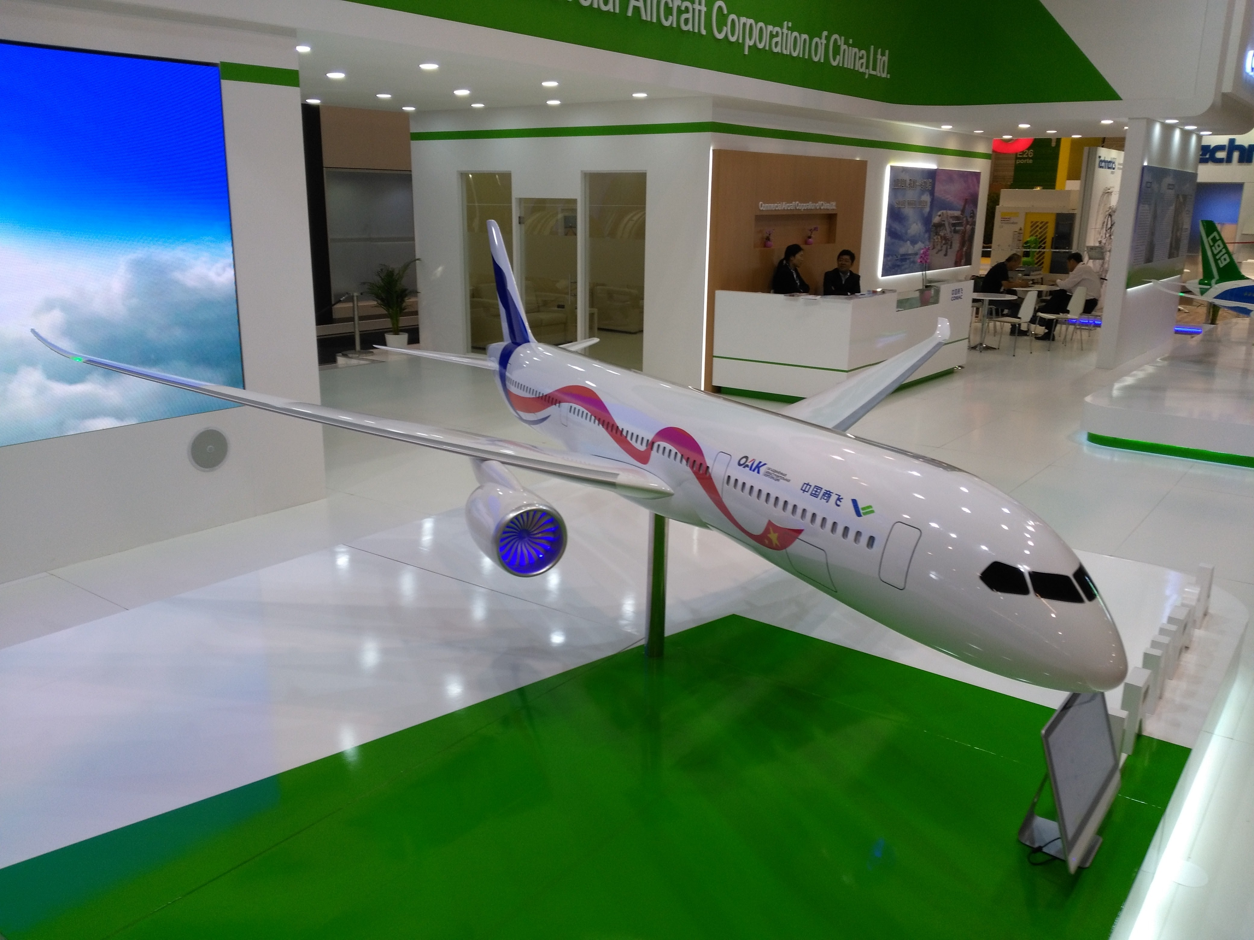 Paris Air Show 2017 Comac C929